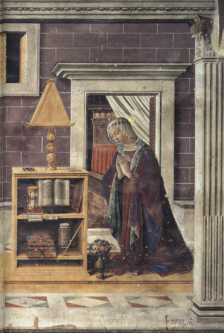 Sebastiano Mainardi: Annunciazione, Duomo, San Gimignano